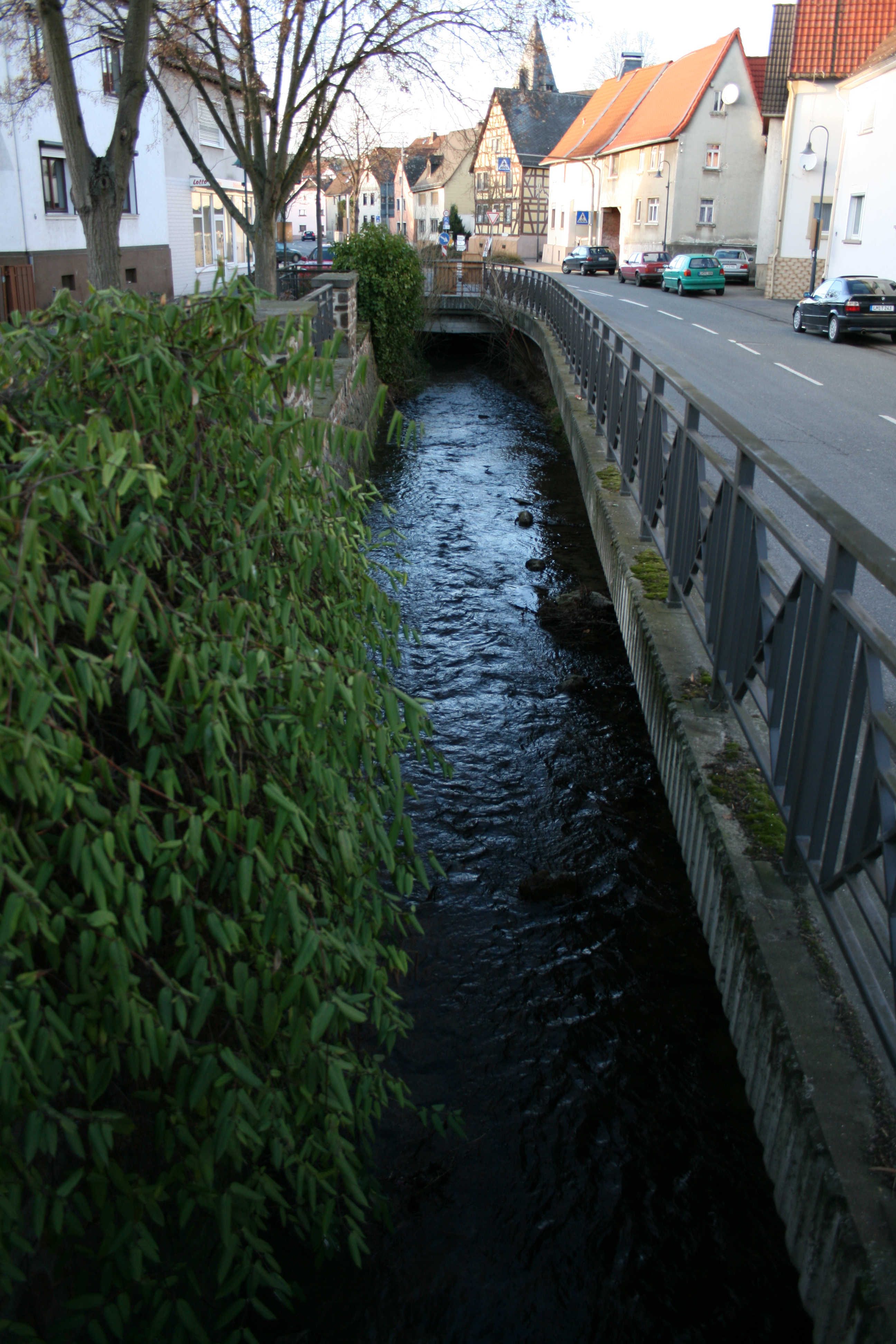 Dombach in Bad Camberg-Erbach, Deutschland